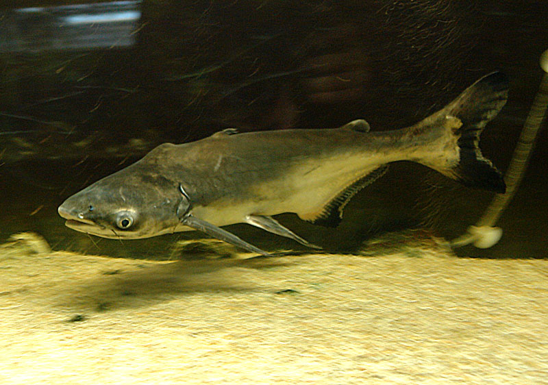 თბილისის ზოოპარკის აკვარიუმი.